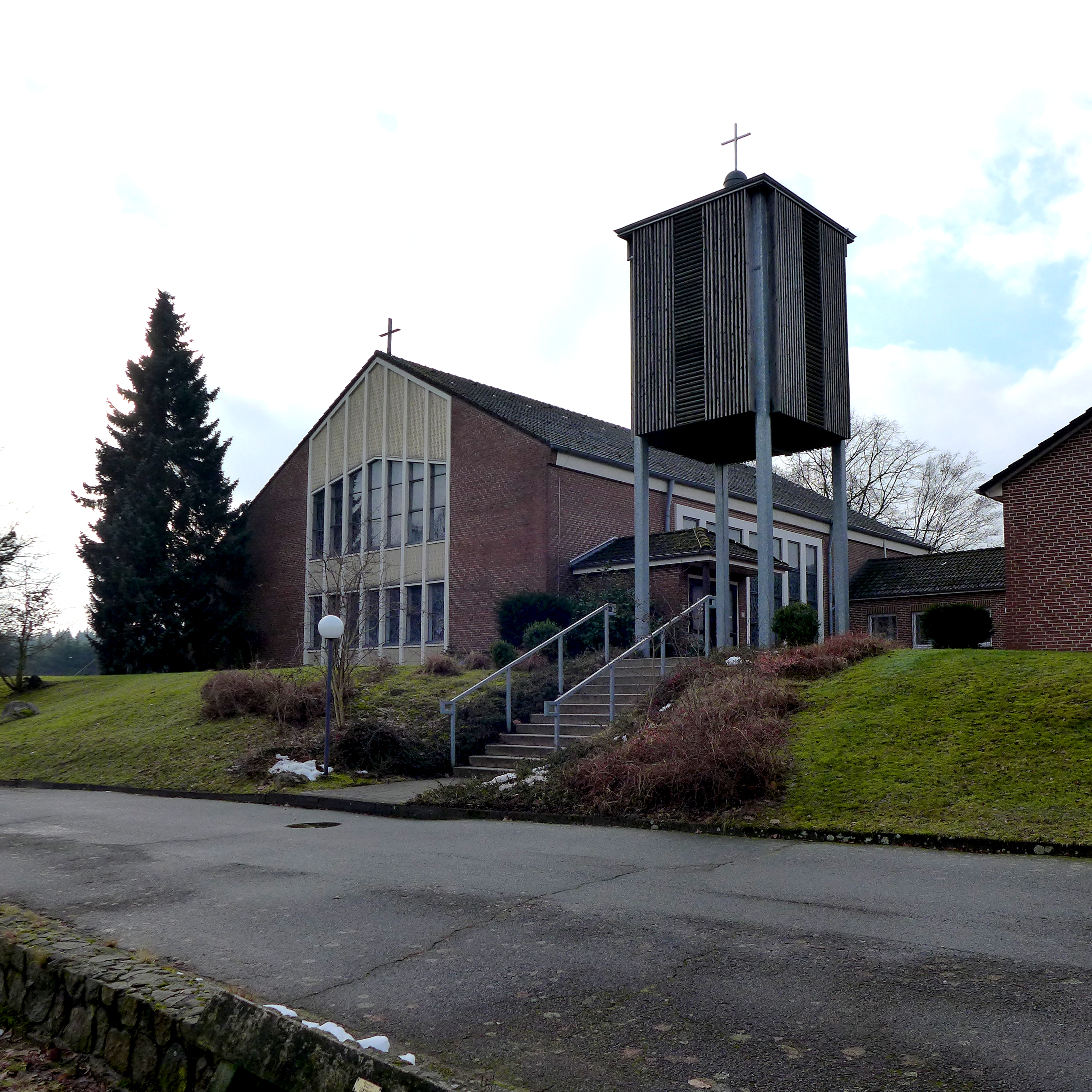 Katholische Kirche St. Marien in Egestorf. Aufnahmedatum 2017-02.